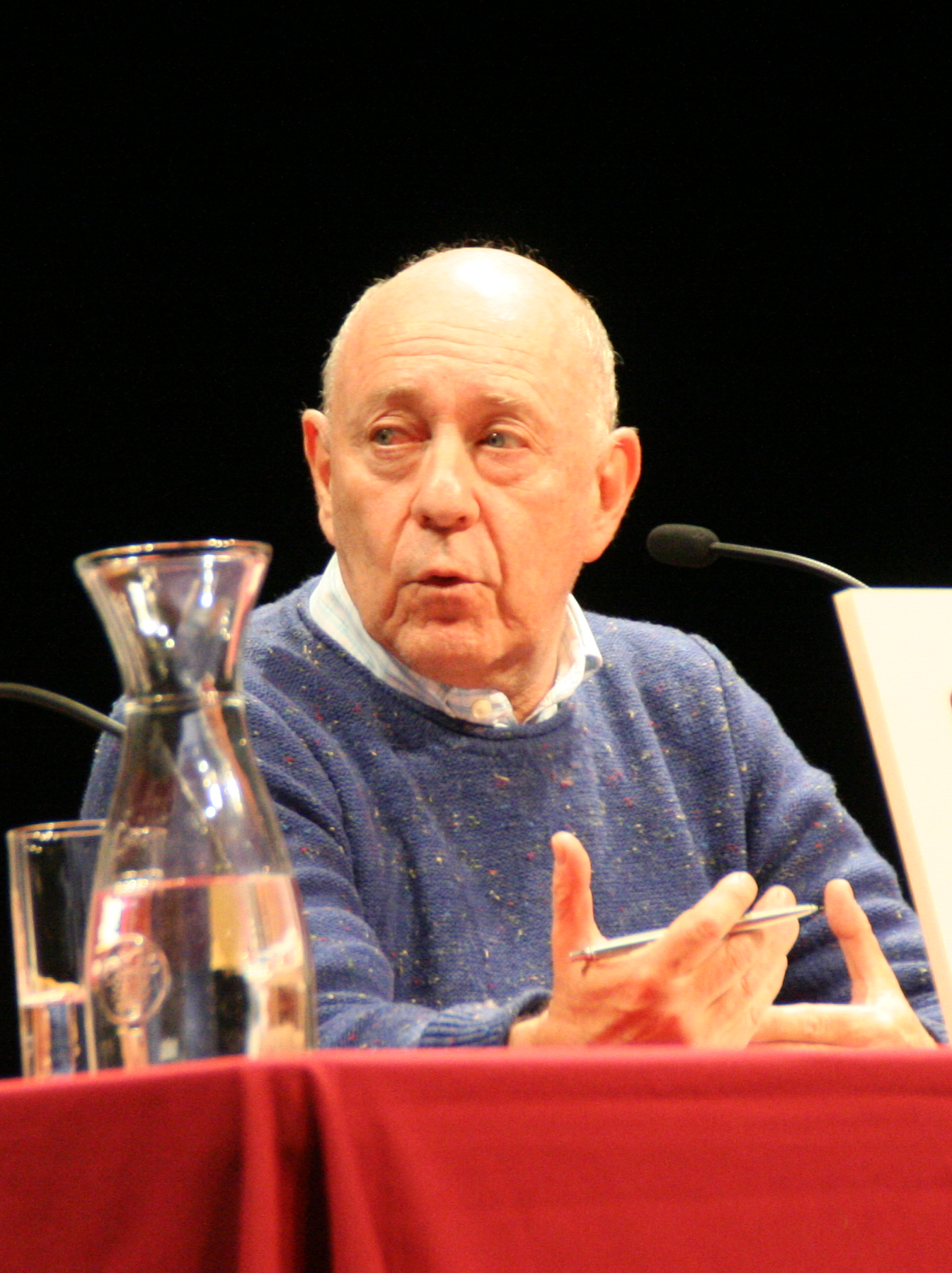 En la imagen, de izquierda a derecha: Carlos Alberto Ruiz y Spektorowski. Foto: @Mundubat CC-By-Sa